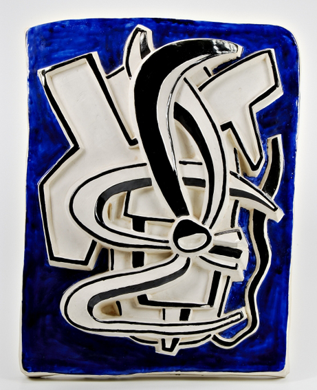 Fernand Leger.